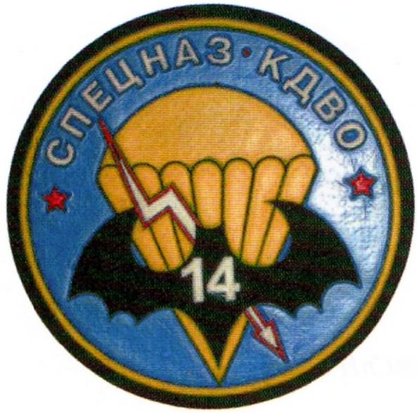 Эмблема 14-й отдельной бригады специального назначения